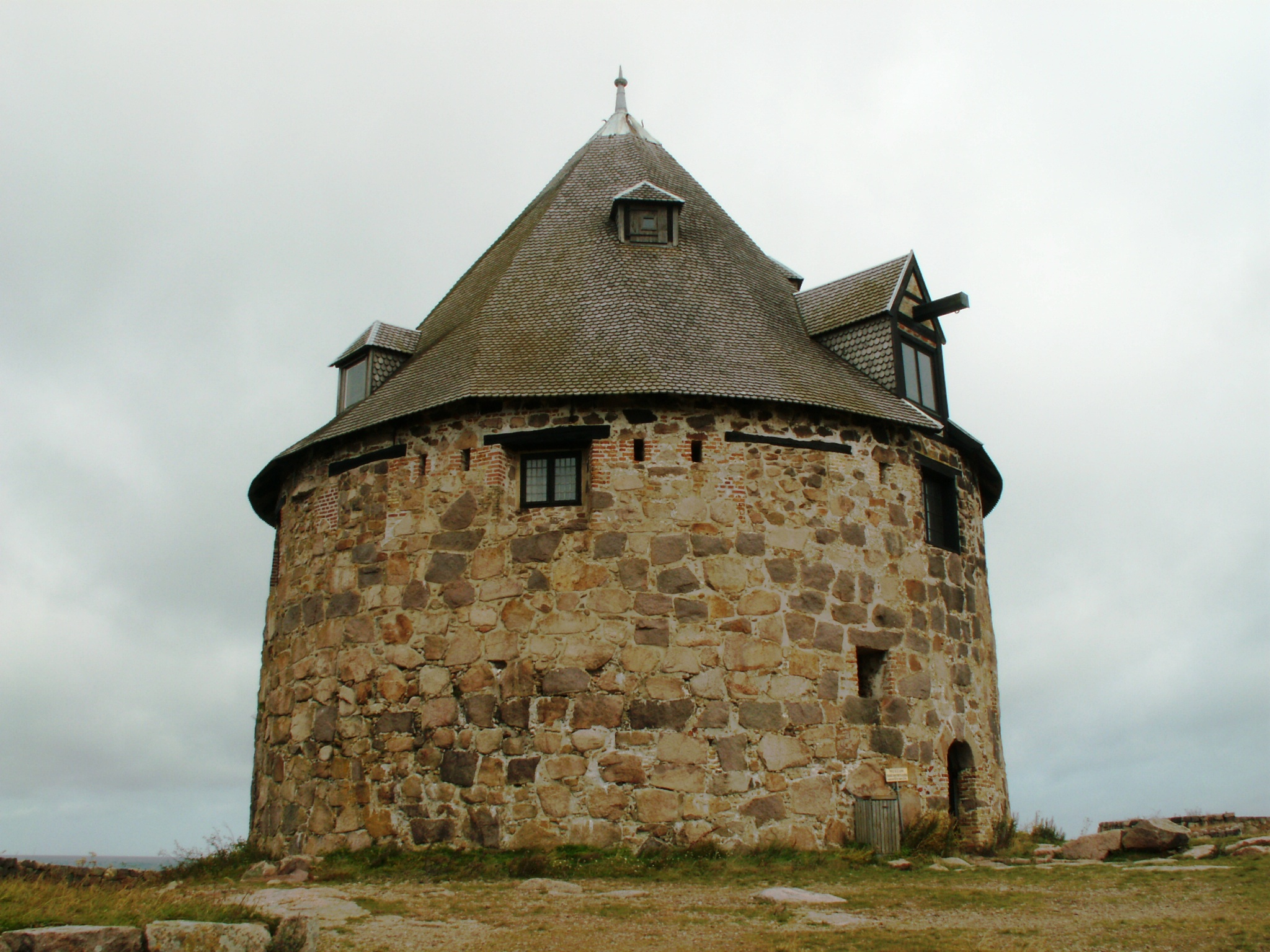 mała wieża